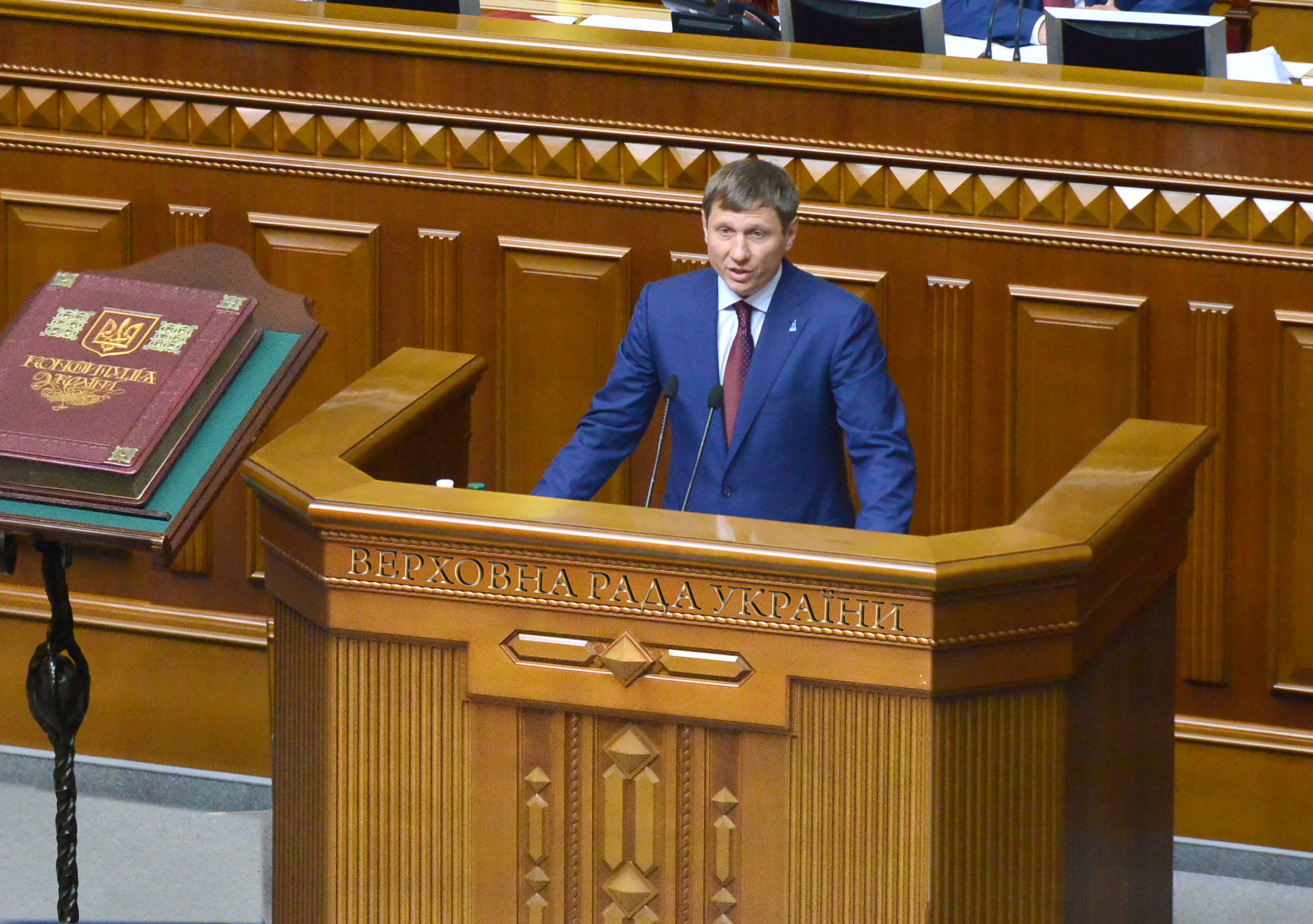 Шахов Сергей Владимирович, выступает с трибуны Верховной Рады Украины, 2016